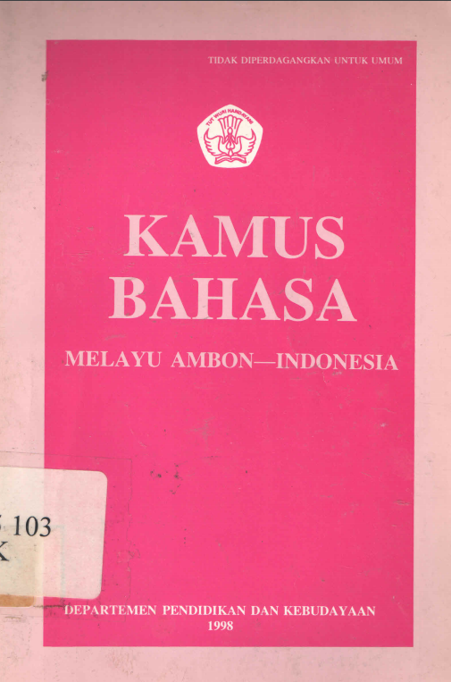 Sampul Kamus Bahasa Melayu Ambon—Indonesia yang diterbitkan oleh Pusat Pembinaan dan Pengembangan Bahasa, Departemen Pendidikan dan Kebudayaan di Jakarta pada 1998.